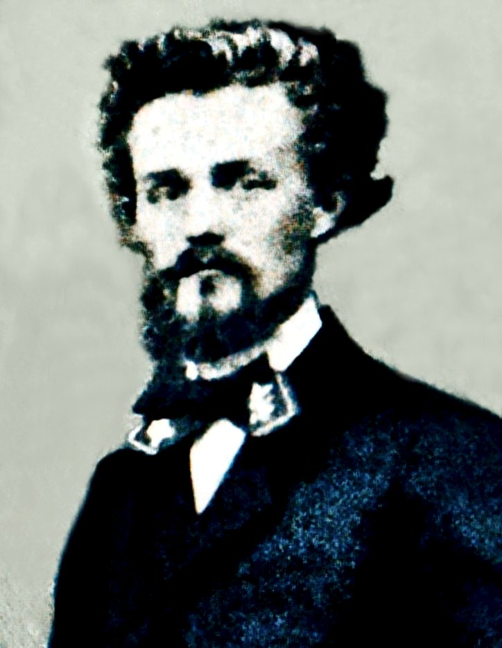 Rudolf Freiherr Lenk von Wolfsberg, FML 1885, *Mainz, 11.08.1834 + Wien, 25.03.1907, Sohn des FZM Wilhelm LvW